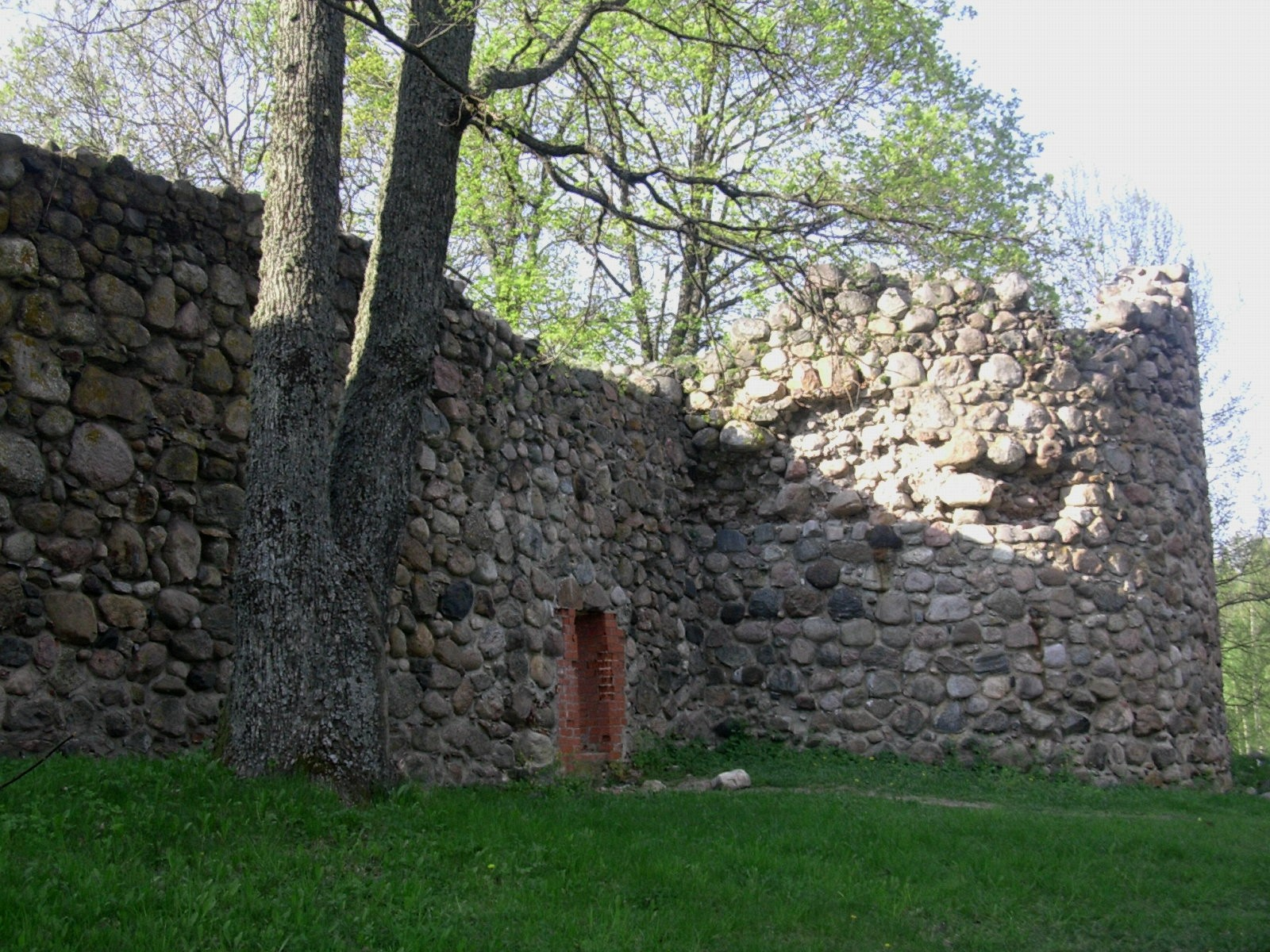 Alulinna eeslinnuse välismüür torniga.